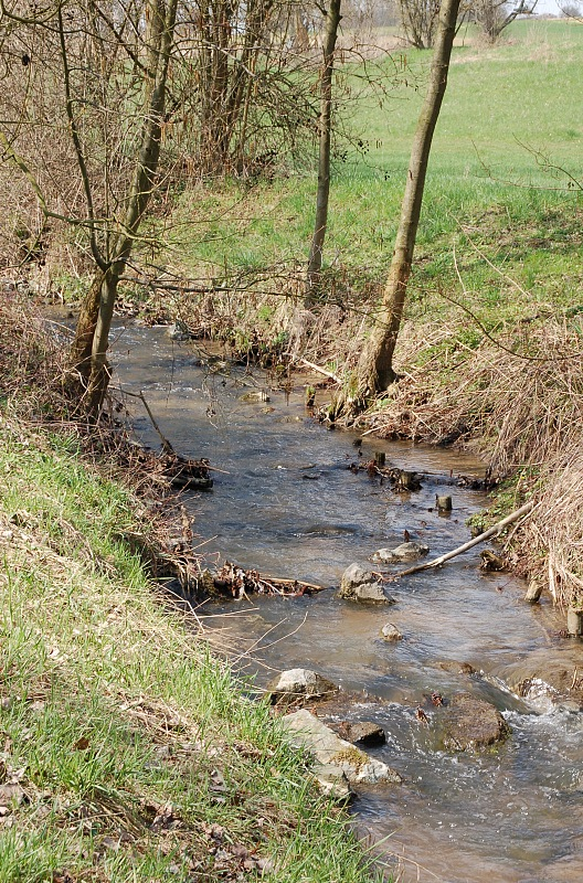 Weilbach, Bach, Nassau, Hesse, Hessen, Germany, Deutschland